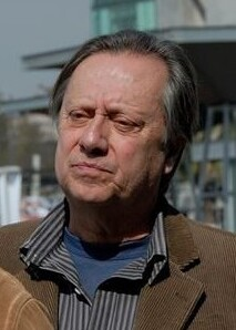 recorrido en la comuna